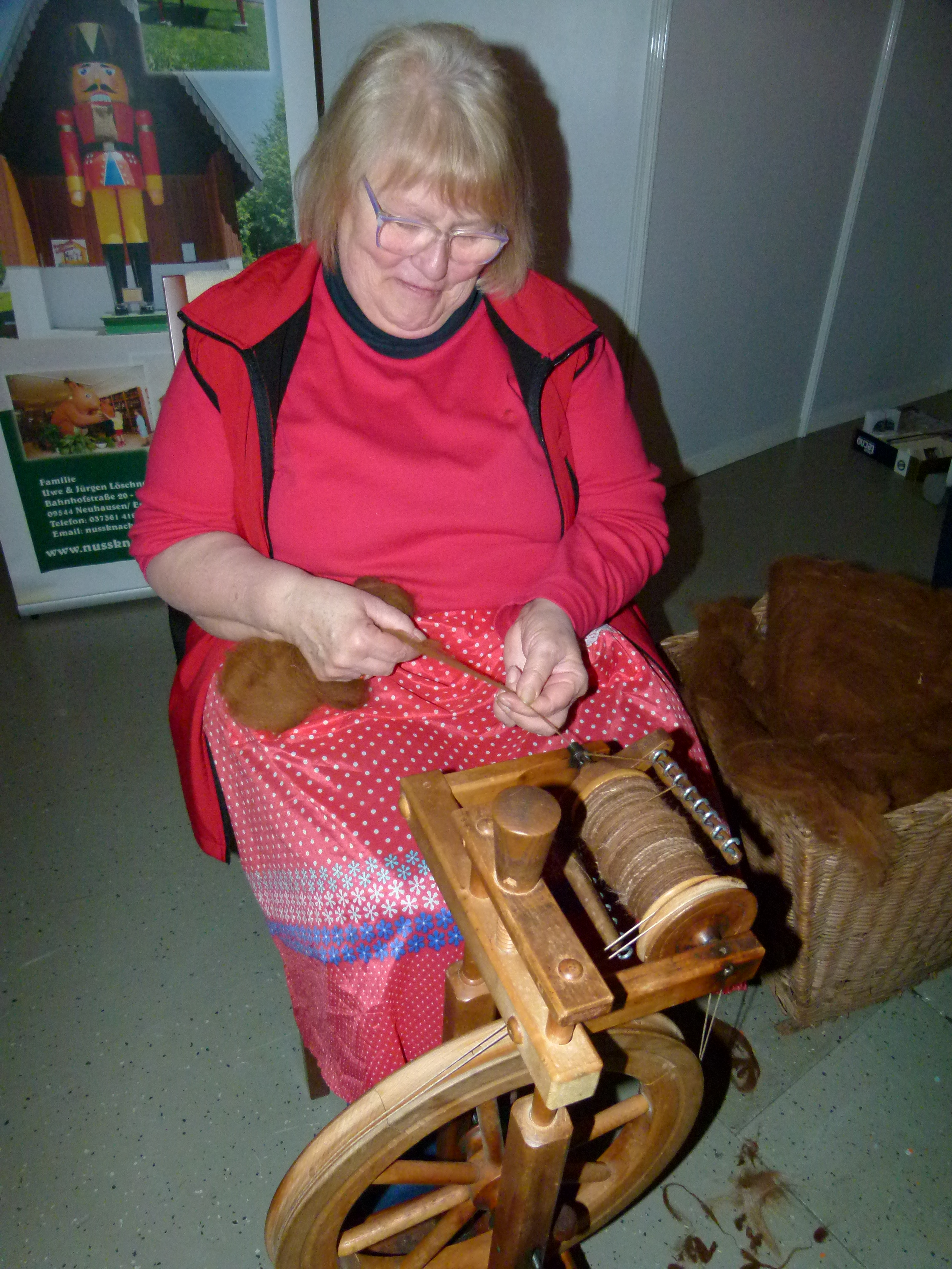 Erzgebirgisches Spinnrad, Nußknackermuseum Neuhausen, Erzgebirge